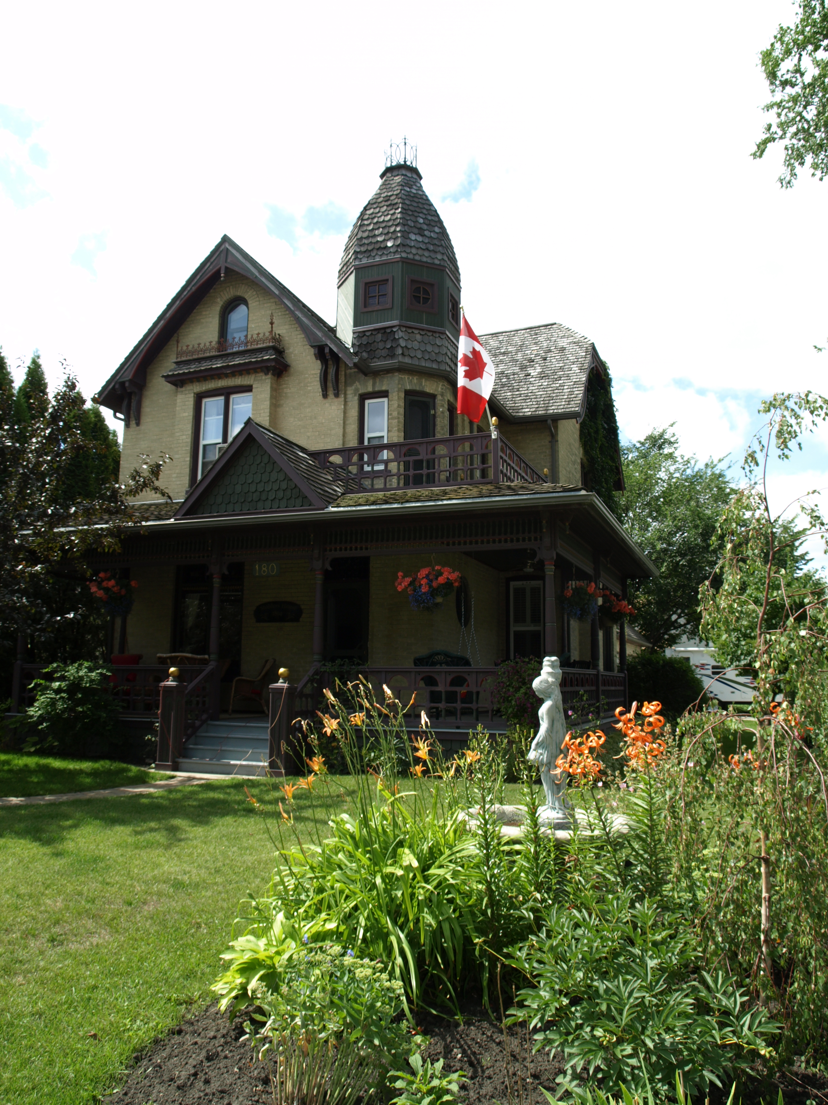 Morden Manitoba Canada